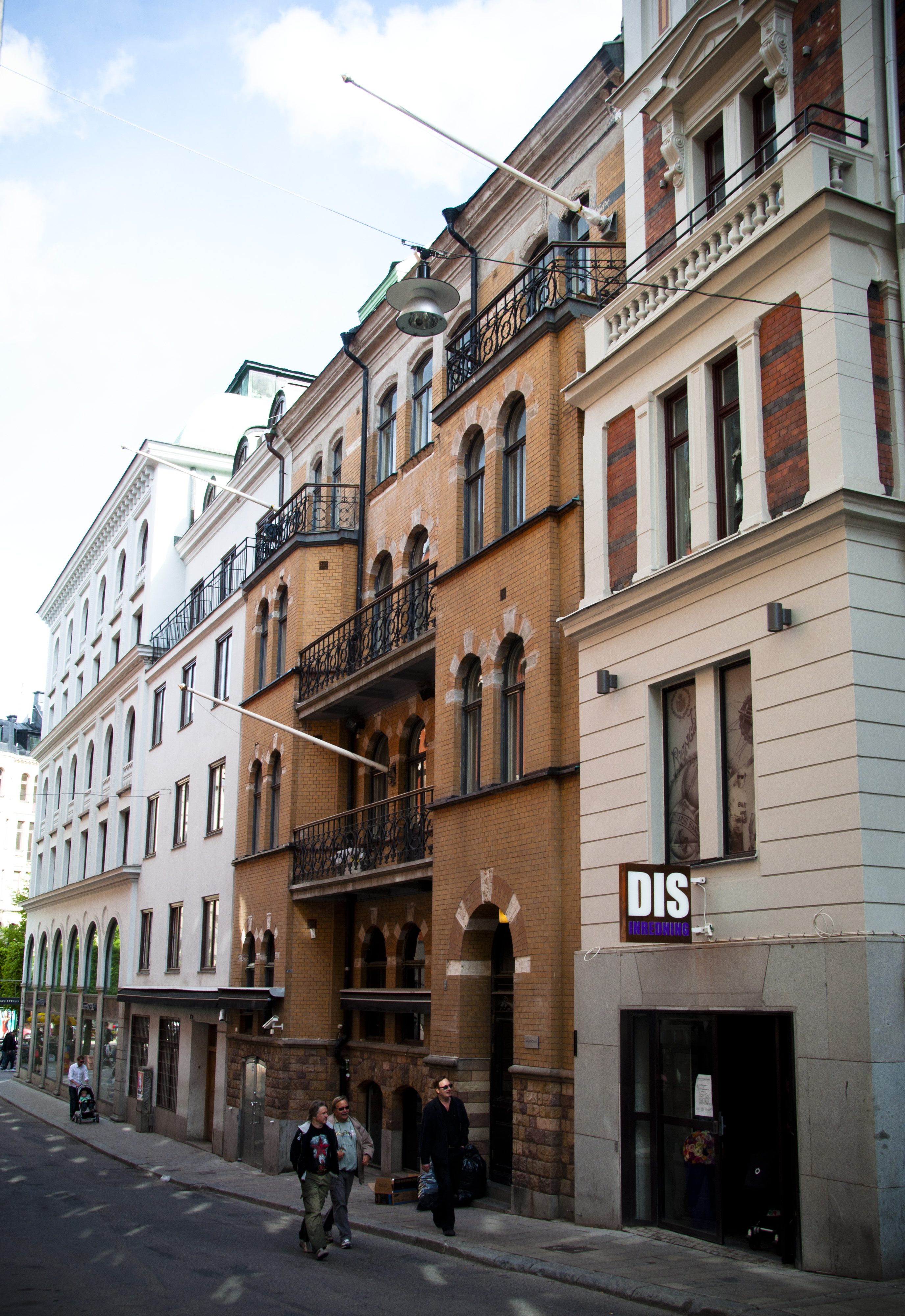 Vildmannen 8, Lästmakargatan 3, Byggnadsår 1895-97, arkitekt Carl Olinder, byggherre Kommanditbolaget Burman & Co, byggmästare J O Berggren